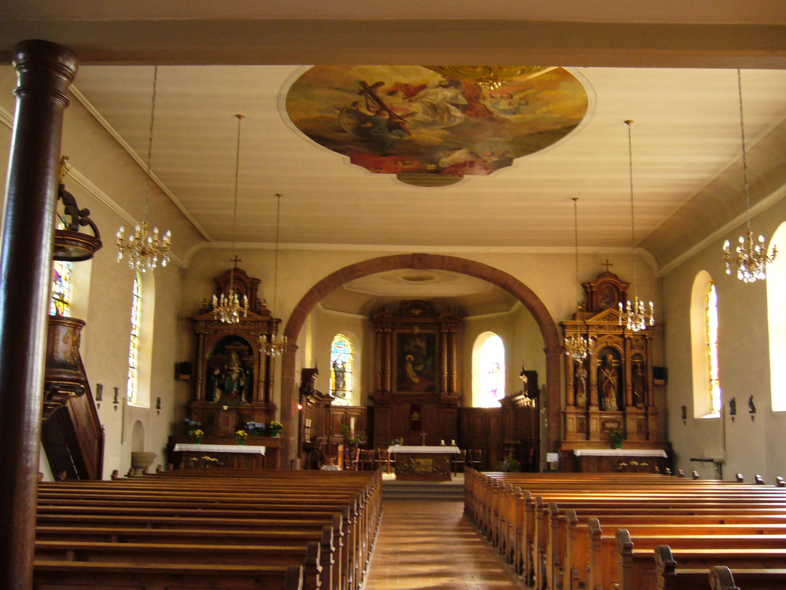 Intérieur de l'église Sainte Rosalie